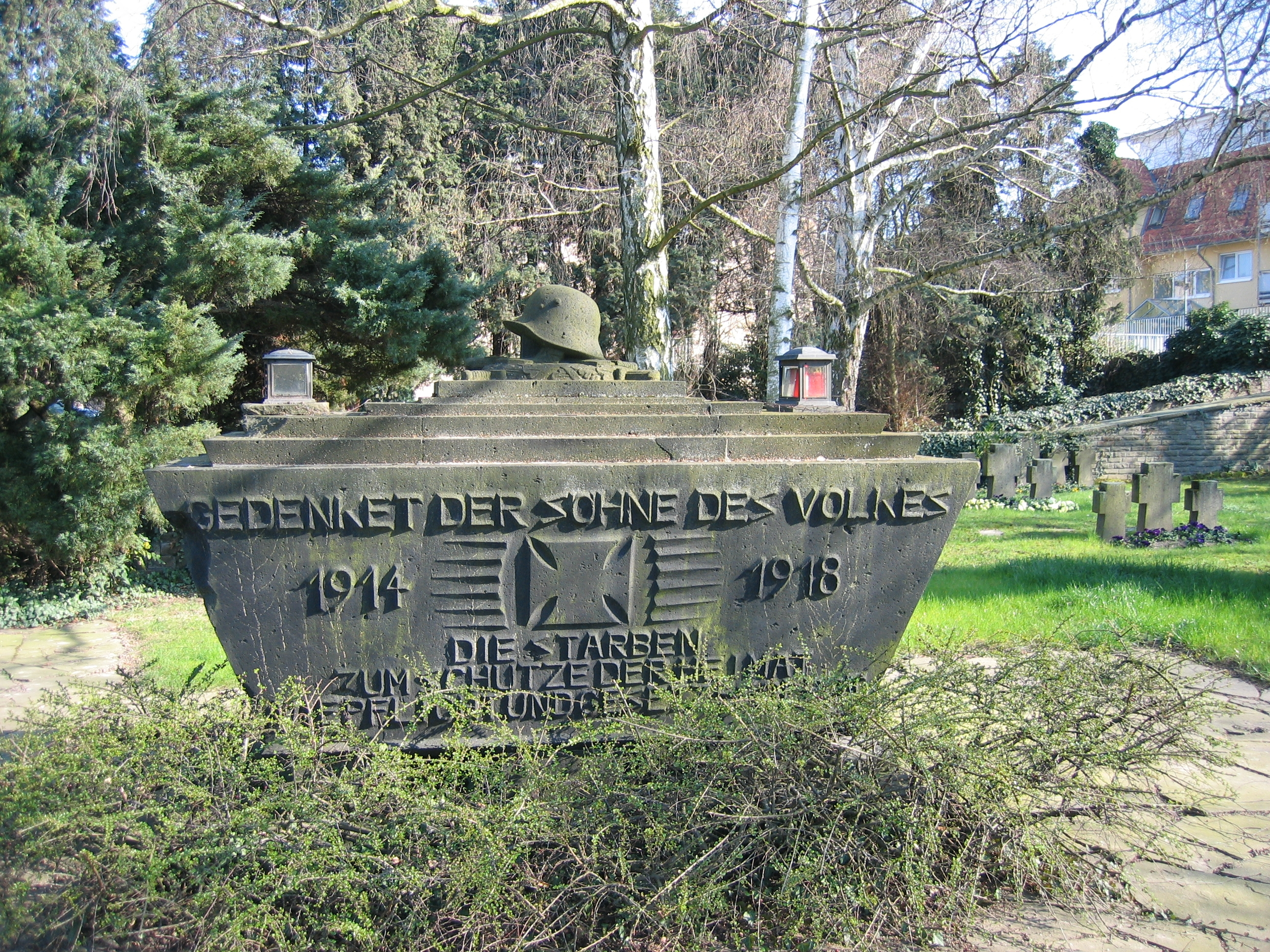 Kriegerdenkmal, Remagen, alter Friedhof